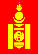 Монгол: Алтан соёмбо тэмдэг.